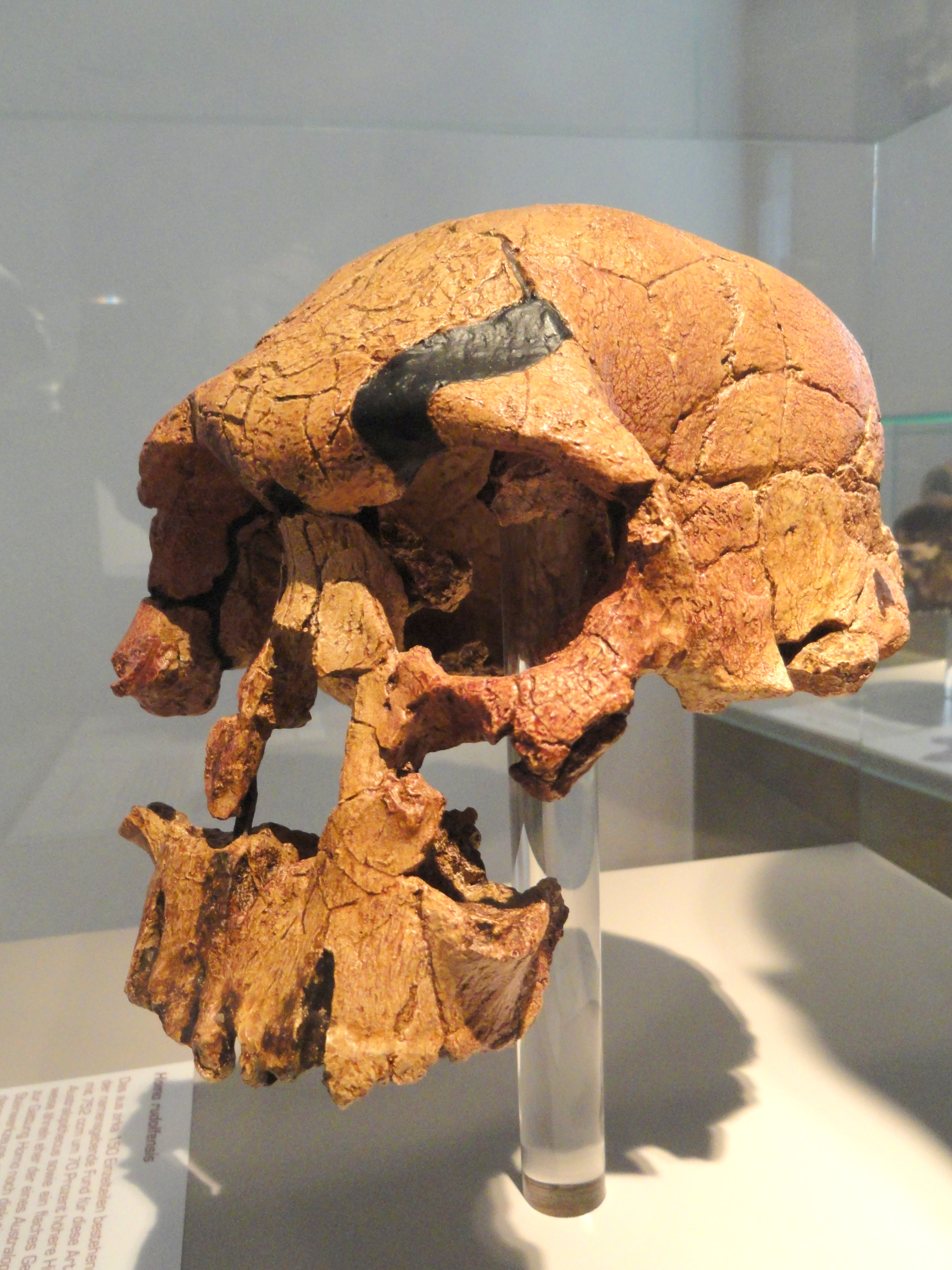 Exhibit in Naturmuseum Senckenberg, Frankfurt am Main, Germany.